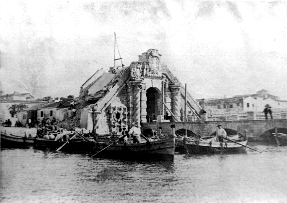 L'abbattimento della porta spagnola Ligny (Siracusa, XIX sec.)